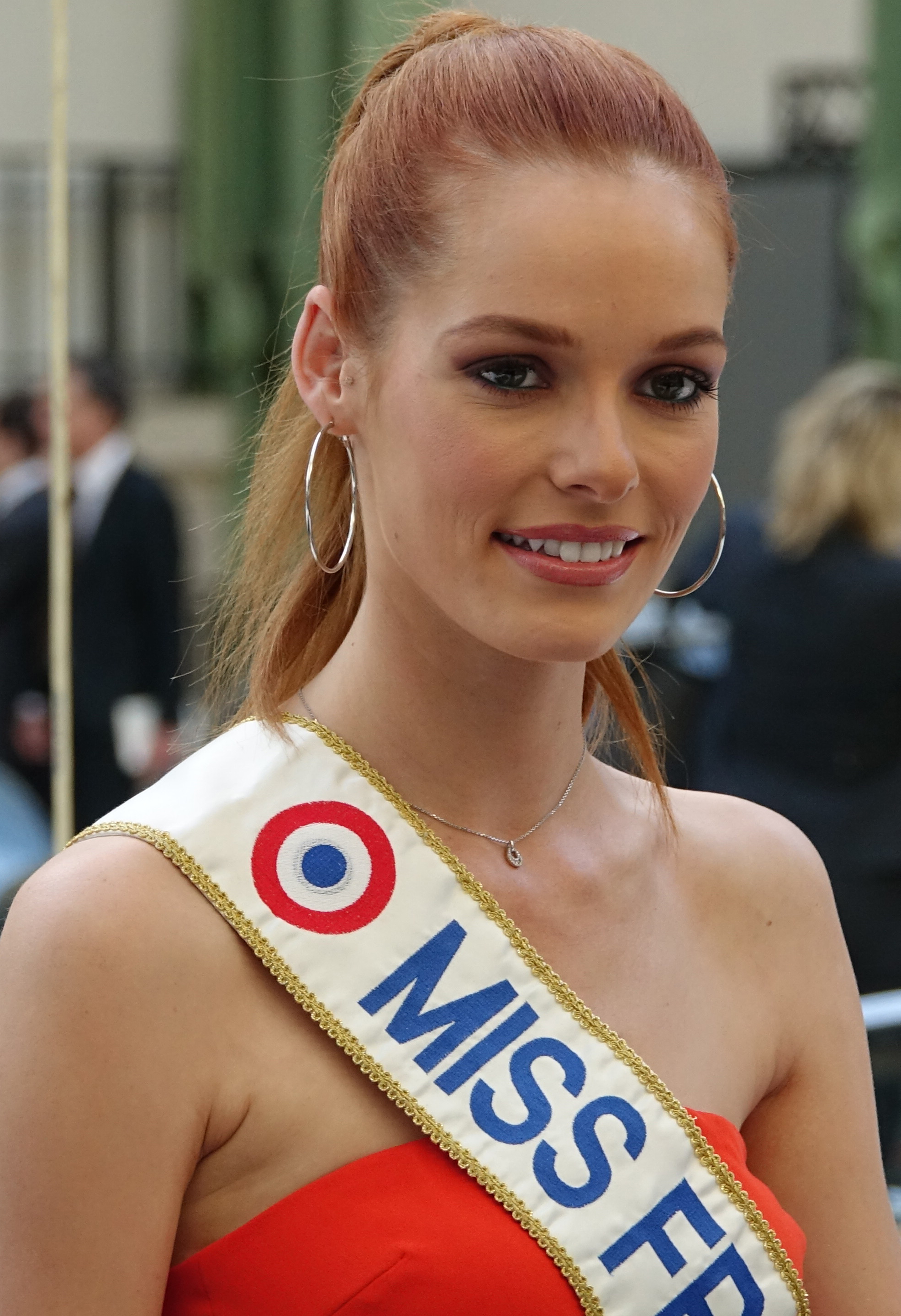 Maëva Coucke au Tour Auto Optic 2000